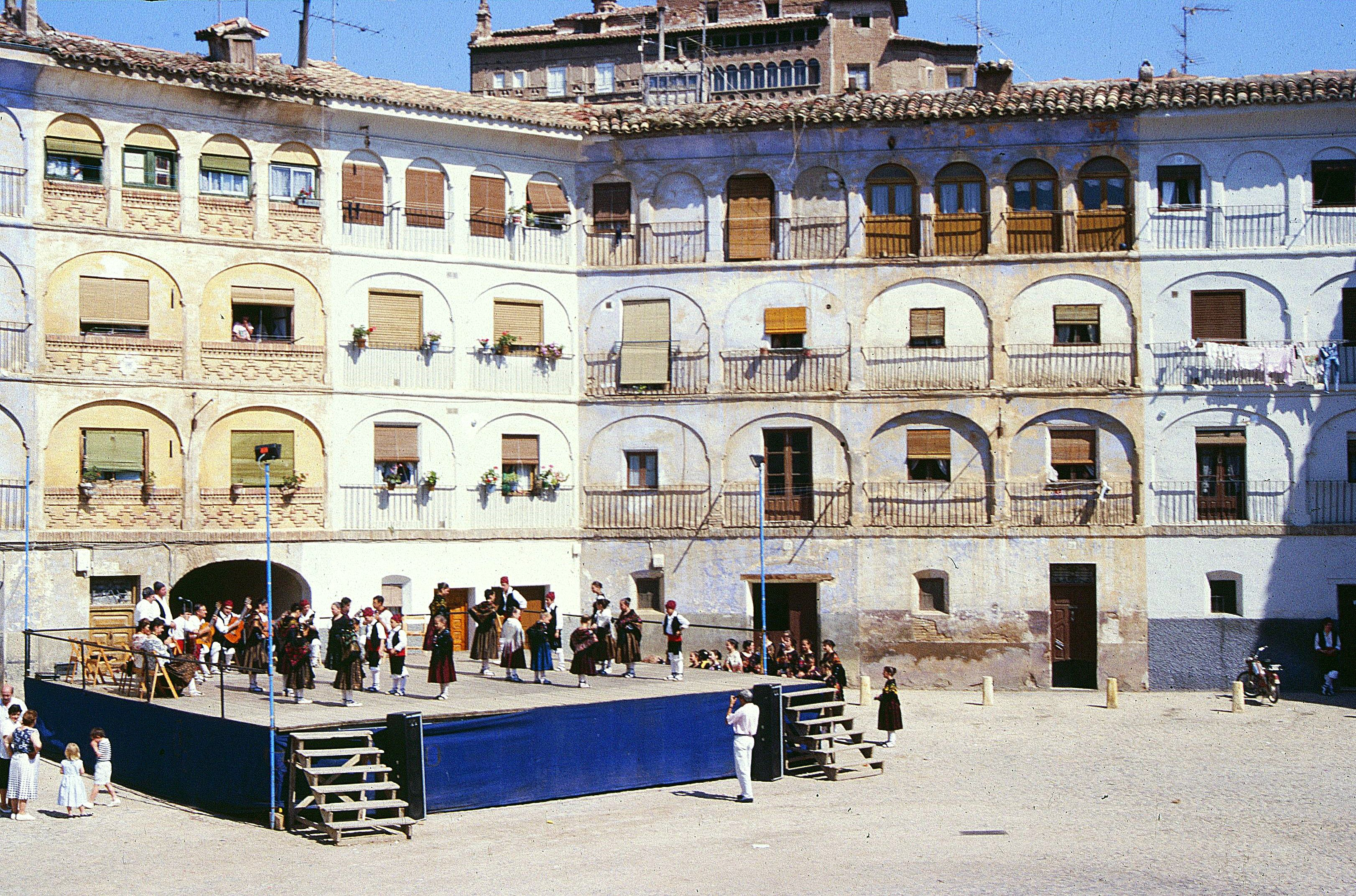 Tarazona: Fiesta auf der Plaza de Toros